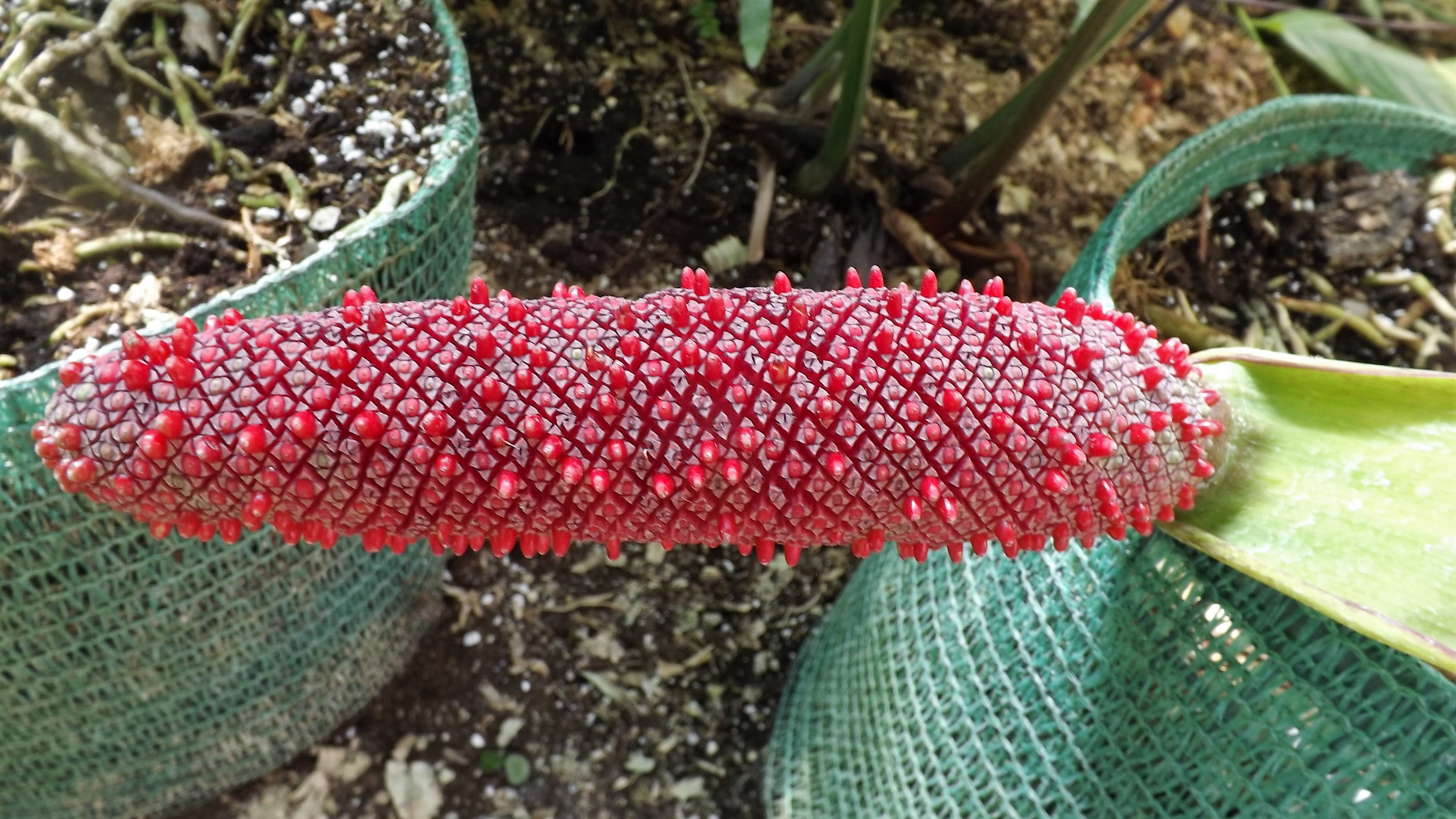 Vácrátóti botanikuskert üvegháza